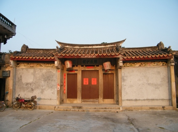 葛洲陈氏祖祠